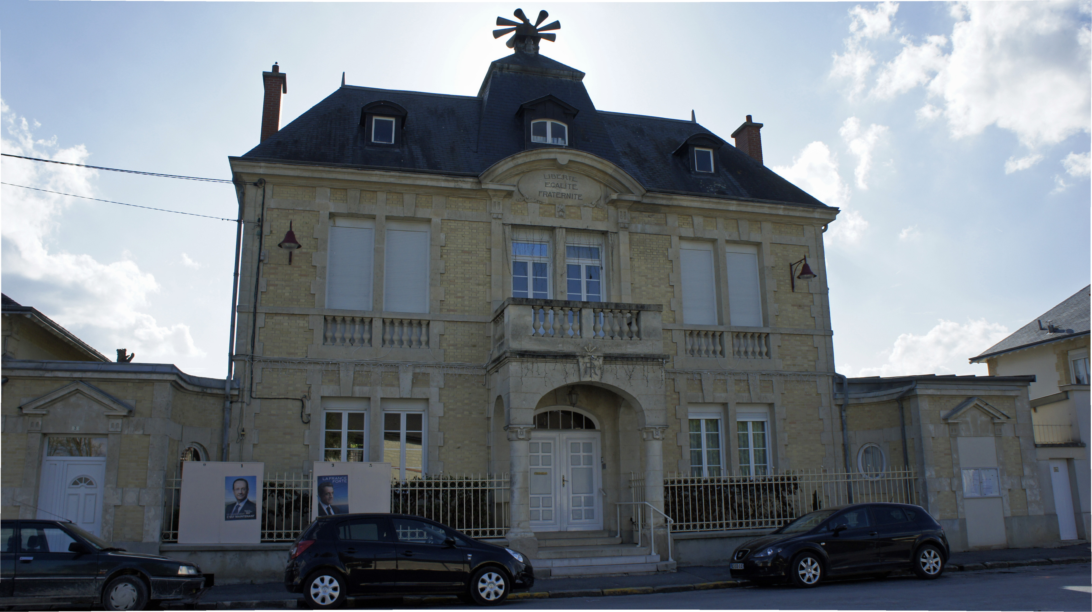 Vue de la mairie de Courcy.